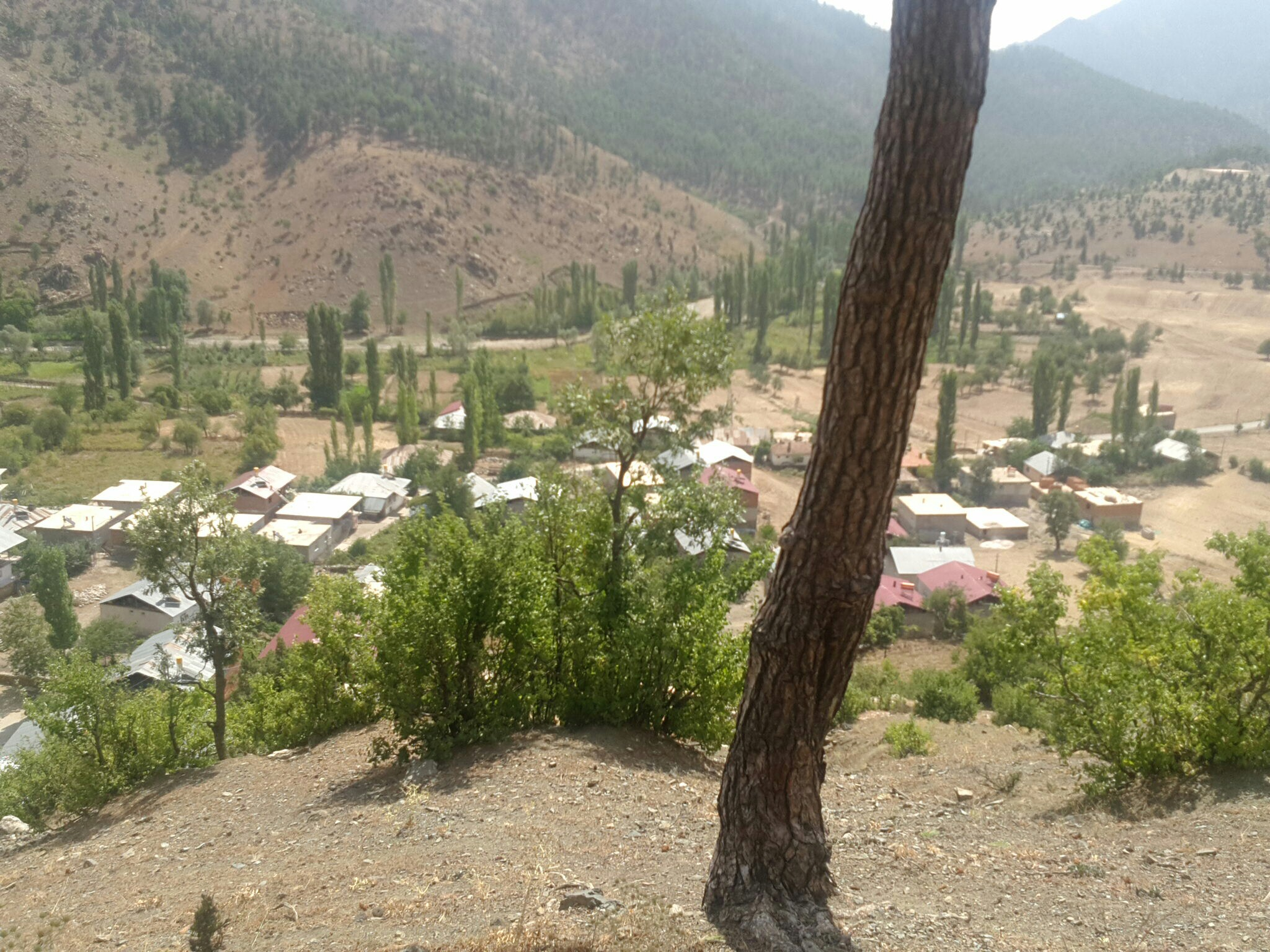 Ulupınar köyü